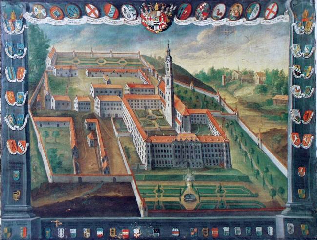 Kloster Ochsenhausen - Die Abtei. Gemälde von 1746/58.